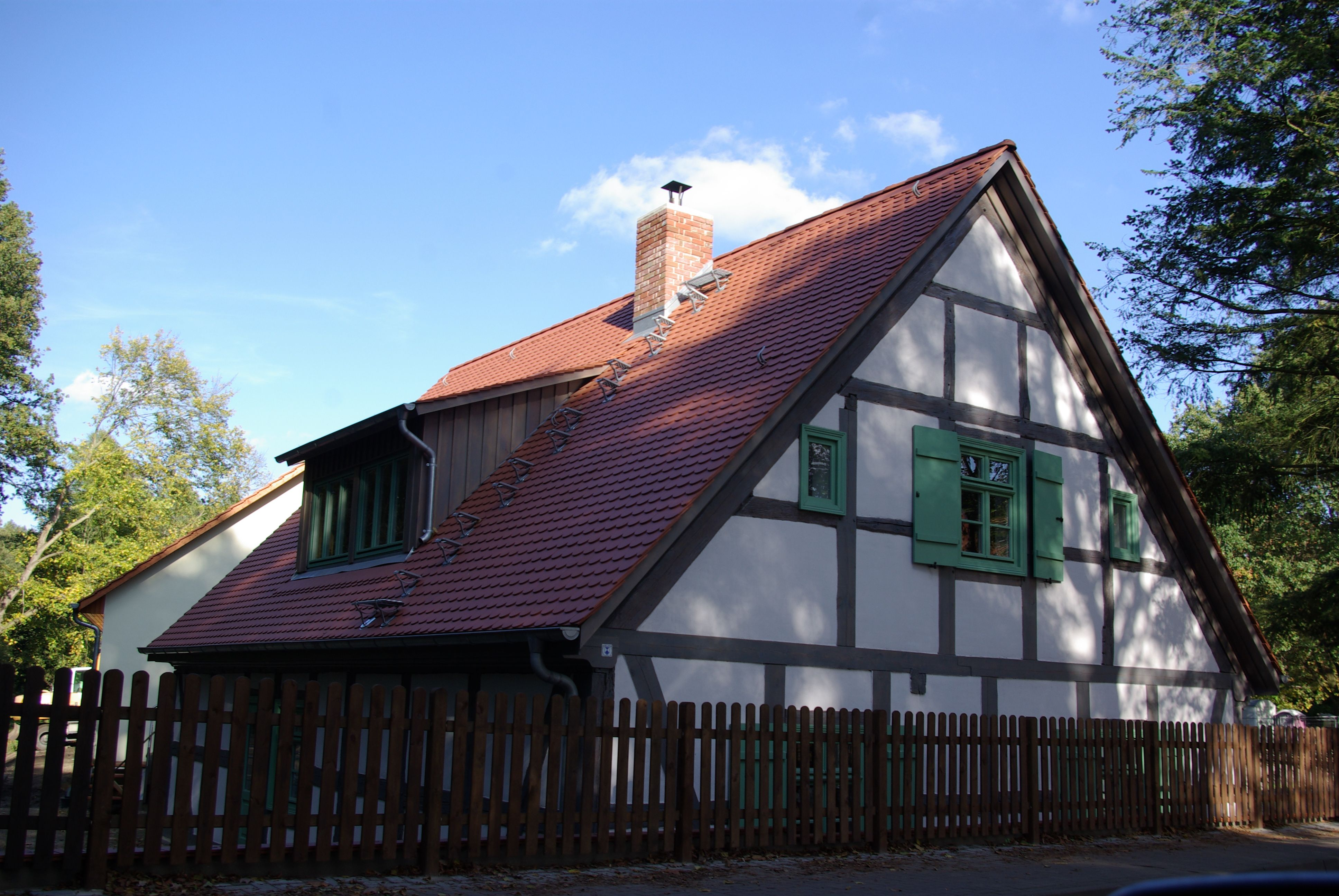 Bestensee in Brandenburg. Das Haus aus Fachwerk in der Hauptstraße 2 war mal das Köngiliche Forstamt. Das Haus steht unter Denkmalschutz.